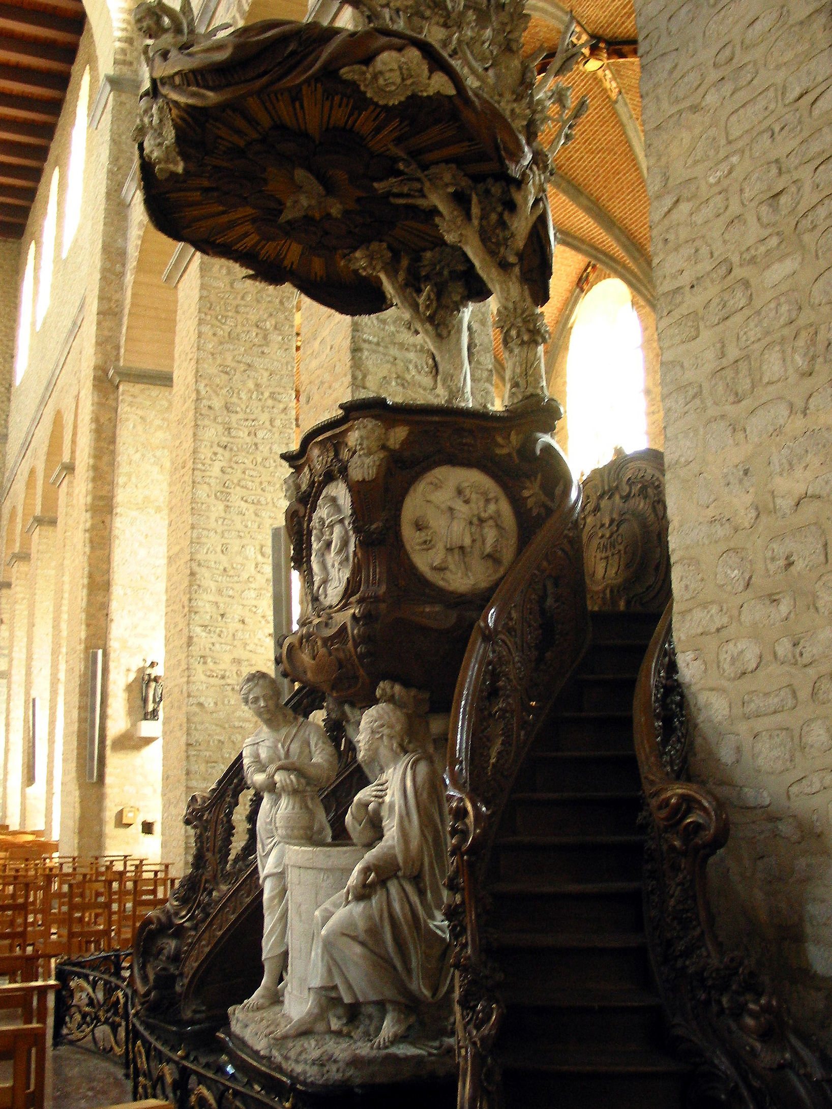 Nivelles (Belgique), chaire de vérité de la Collégiale Sainte-Gertrude de Nivelles avec son groupe représentant le Christ et la Samaritaine ainsi que ses médaillons représentant les paraboles du semeur, de l’enfant prodigue et du bon père de familles dûs au sculpteur Laurent Delvaux (XVIIIe siècle).